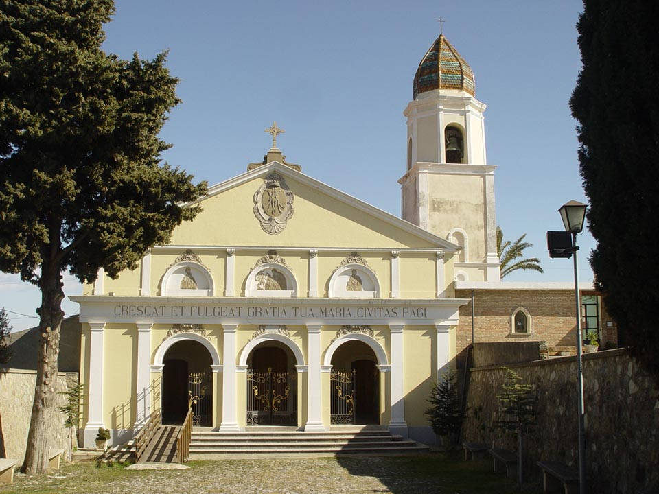 Facciata Santuario Madonna delle Grazie (Spezzano Albanese - CS) Foto di E. Armentano